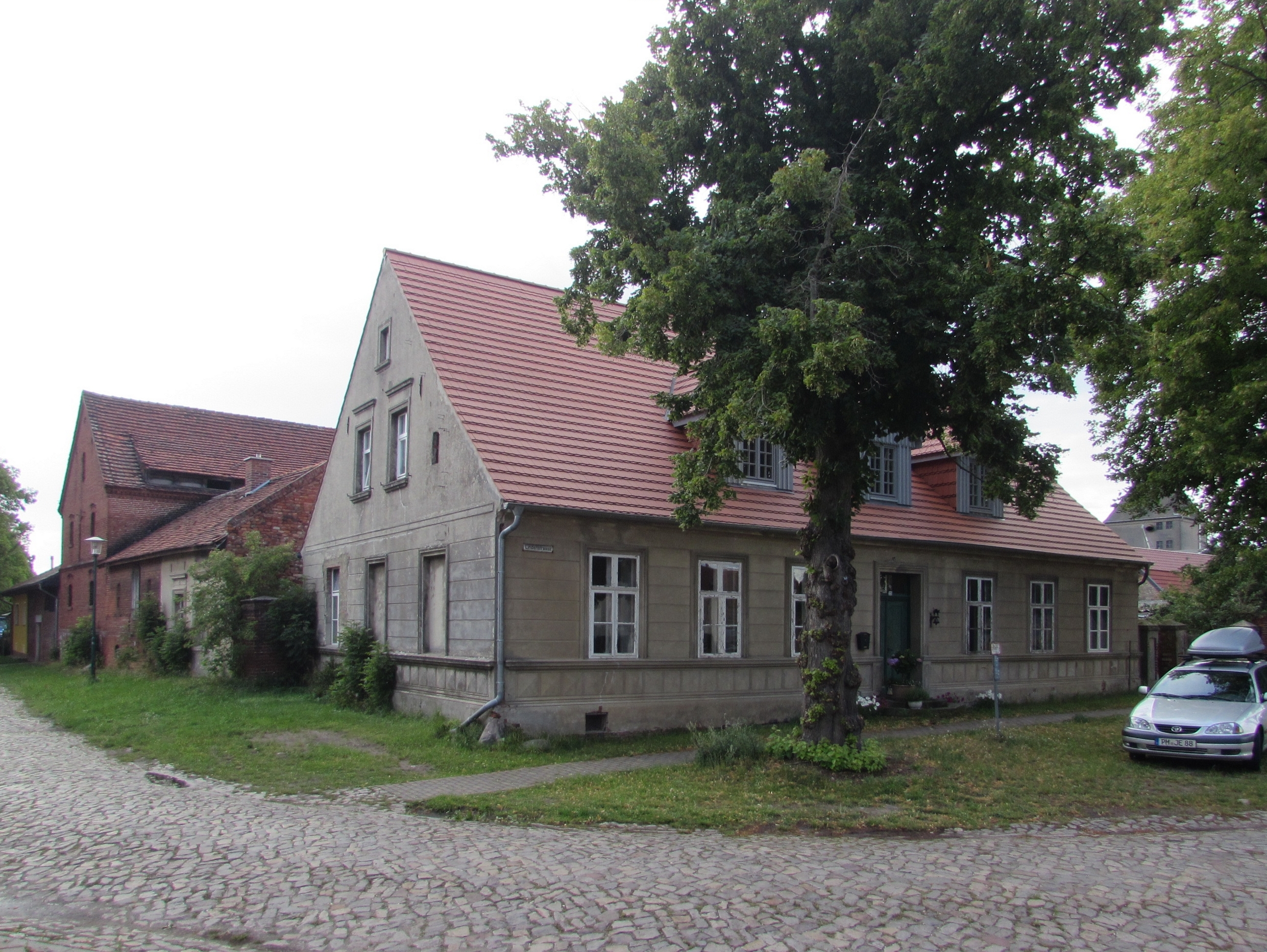 baudenkmal unter der adresse lindenstraße 22, bensdorf